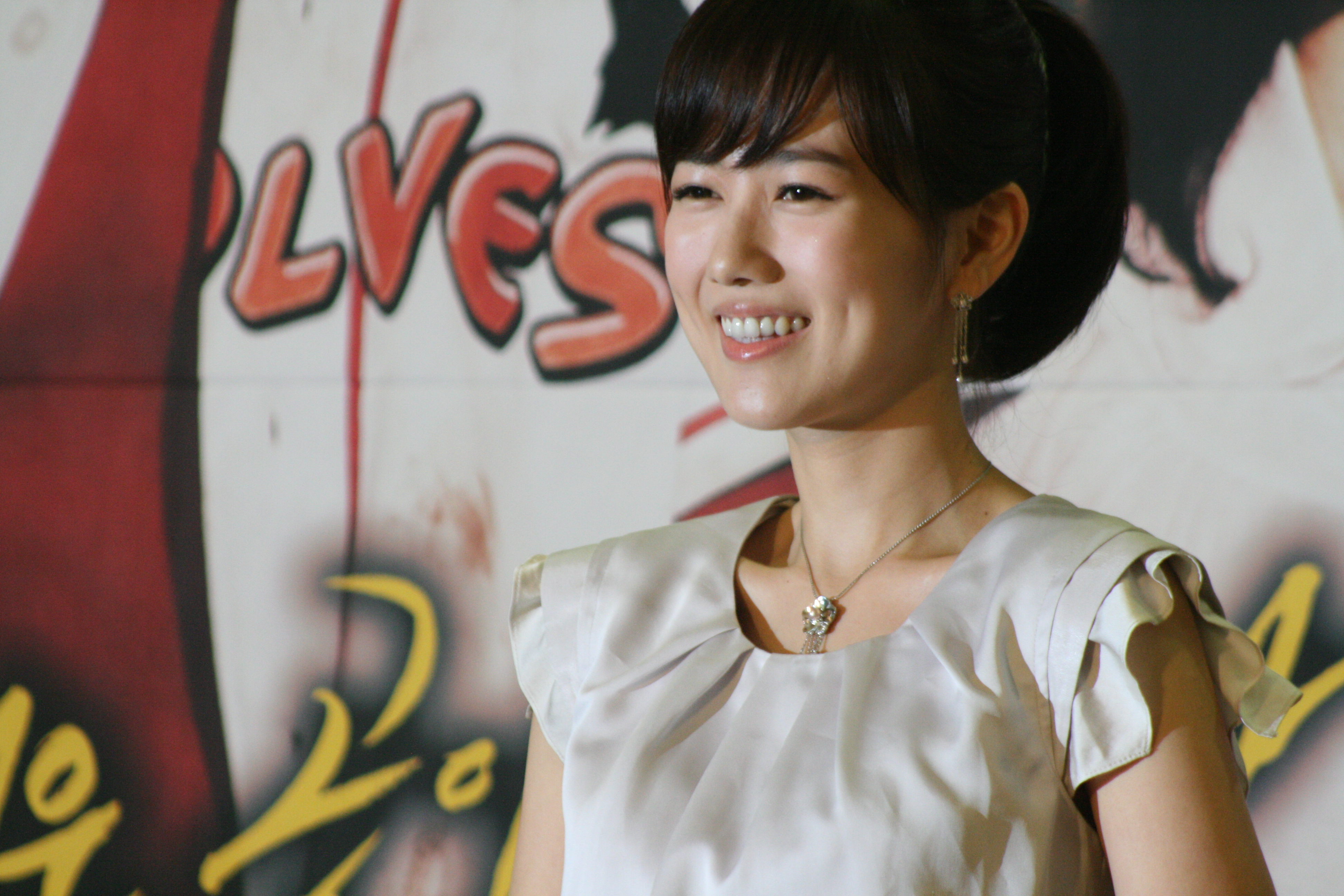 2009년 4월 27일 열린 MBC 드라마 《2009 외인구단》 제작발표회에서의 송아영.